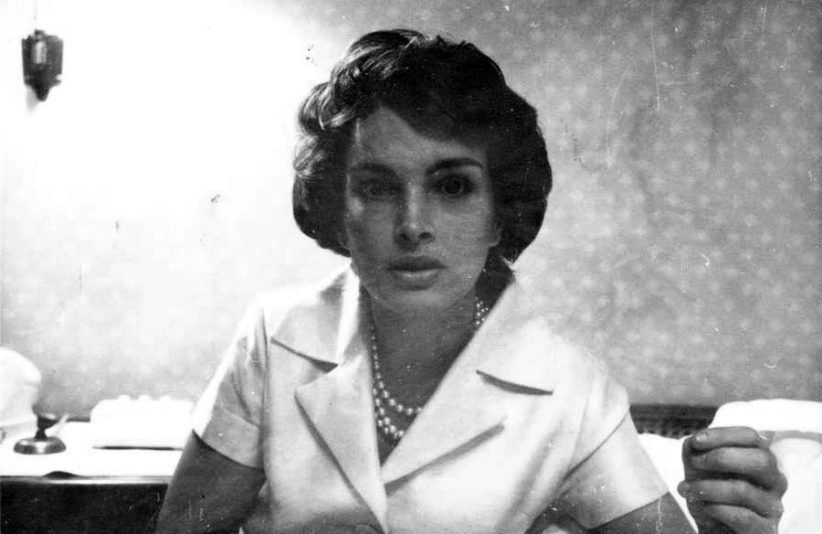 Português do Brasil: Fotografia de Maria Thereza Goulart